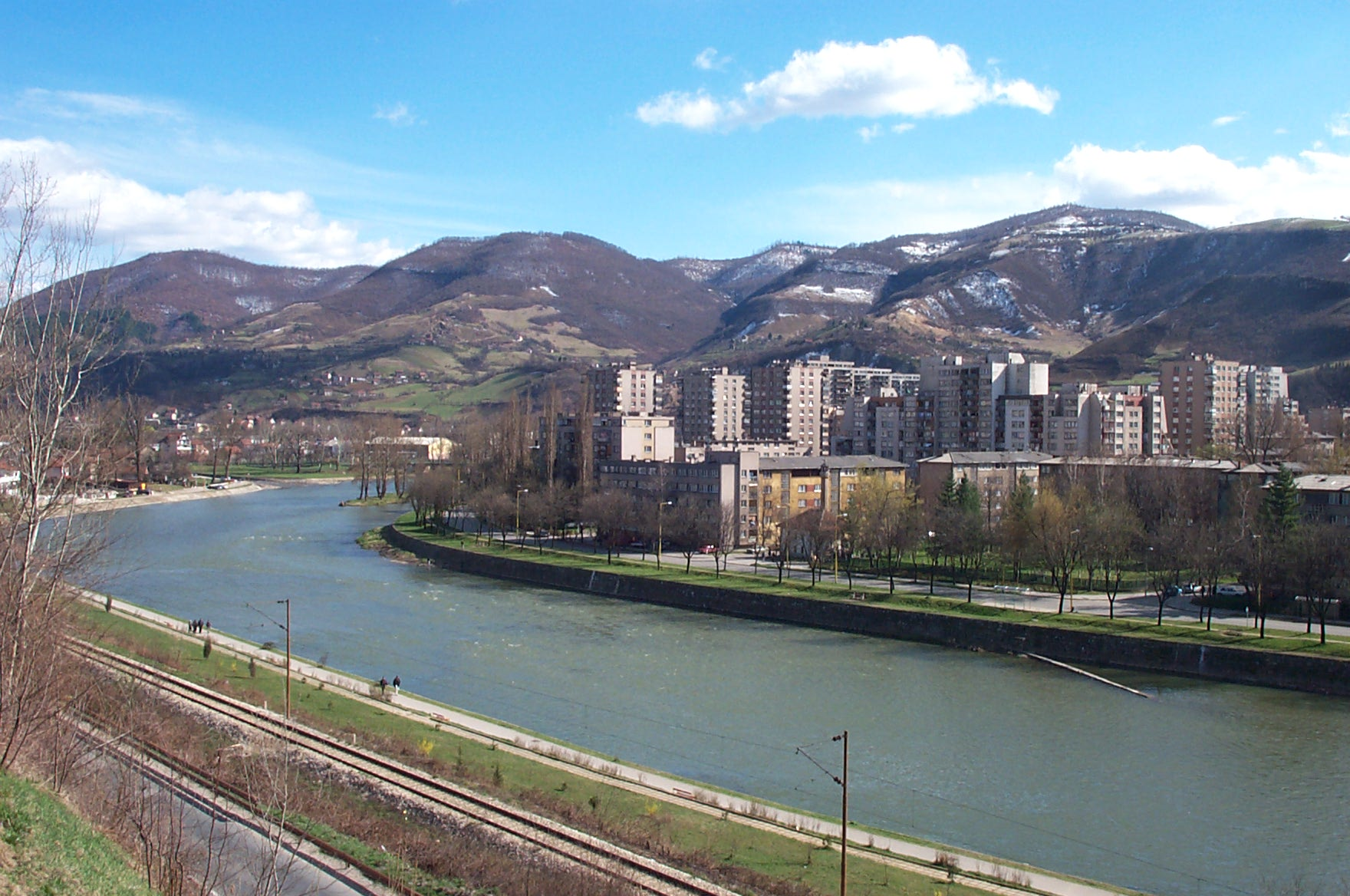 Vue de la ville de Zenica (Bosnie-Herzégovine) depuis les rives de la rivière Bosna -2003